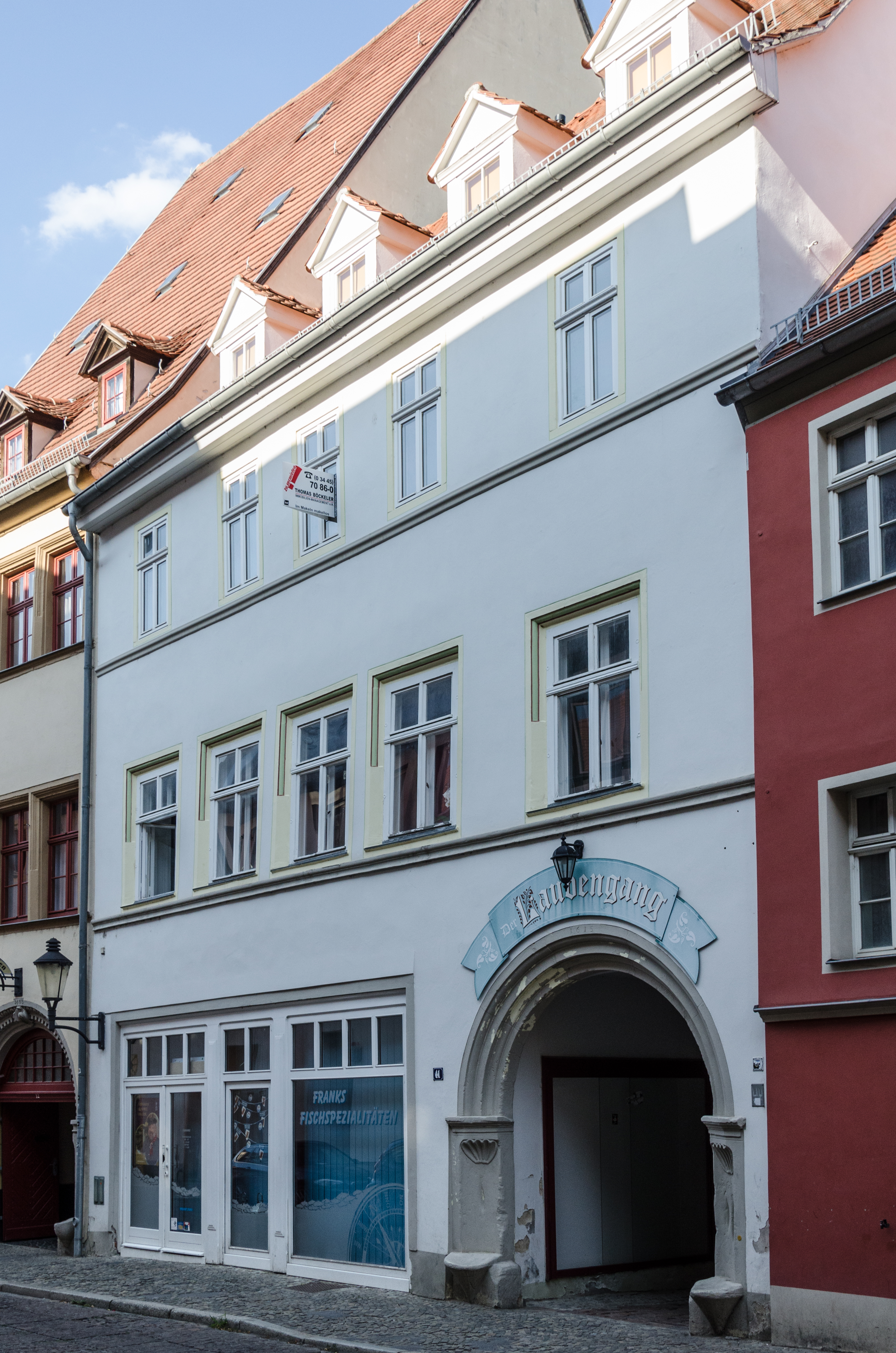 Naumburg, Marienstraße 11